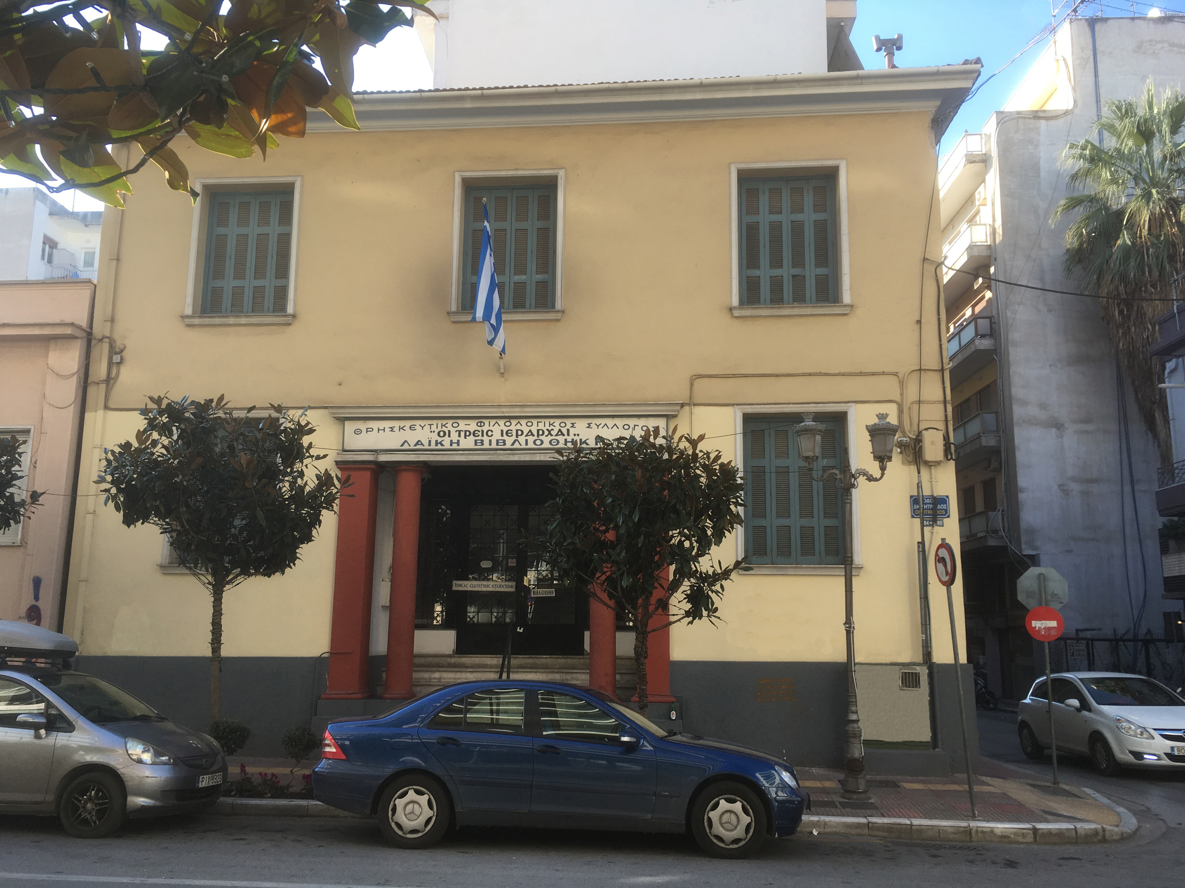 Βόλος. Η βιβλιοθήκη του Συλλόγου «Οι Τρεις Ιεράρχες», το οποίο κτίστηκε από τα θεμέλια μετά το σεισμό του 1955.